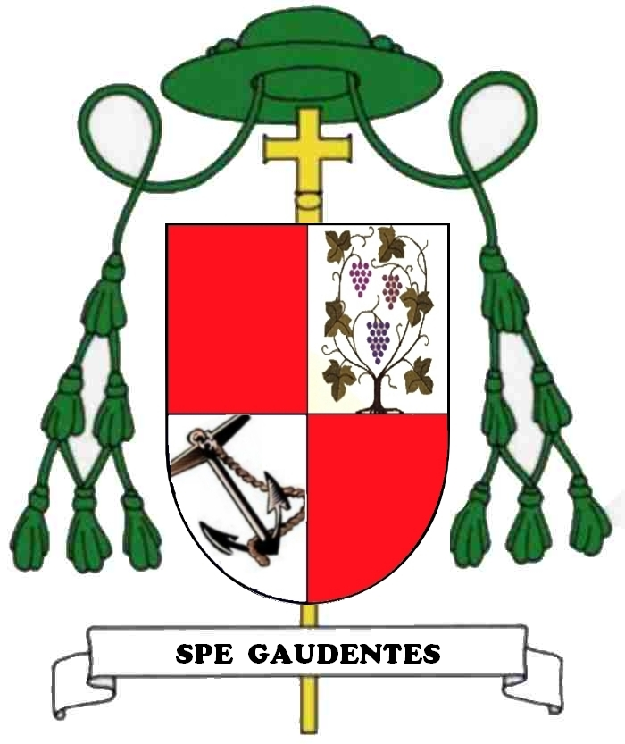 Wappen Carl Ebert 1916 - 1974, Weihbischof im Bischöflichen Amt Erfurt-Meiningen, Bischofsvikar in Meiningen-Saalfeld zum Bistum Würzburg gehörend, deshalb auch Weihbischof in Würzburg (1973-1974)